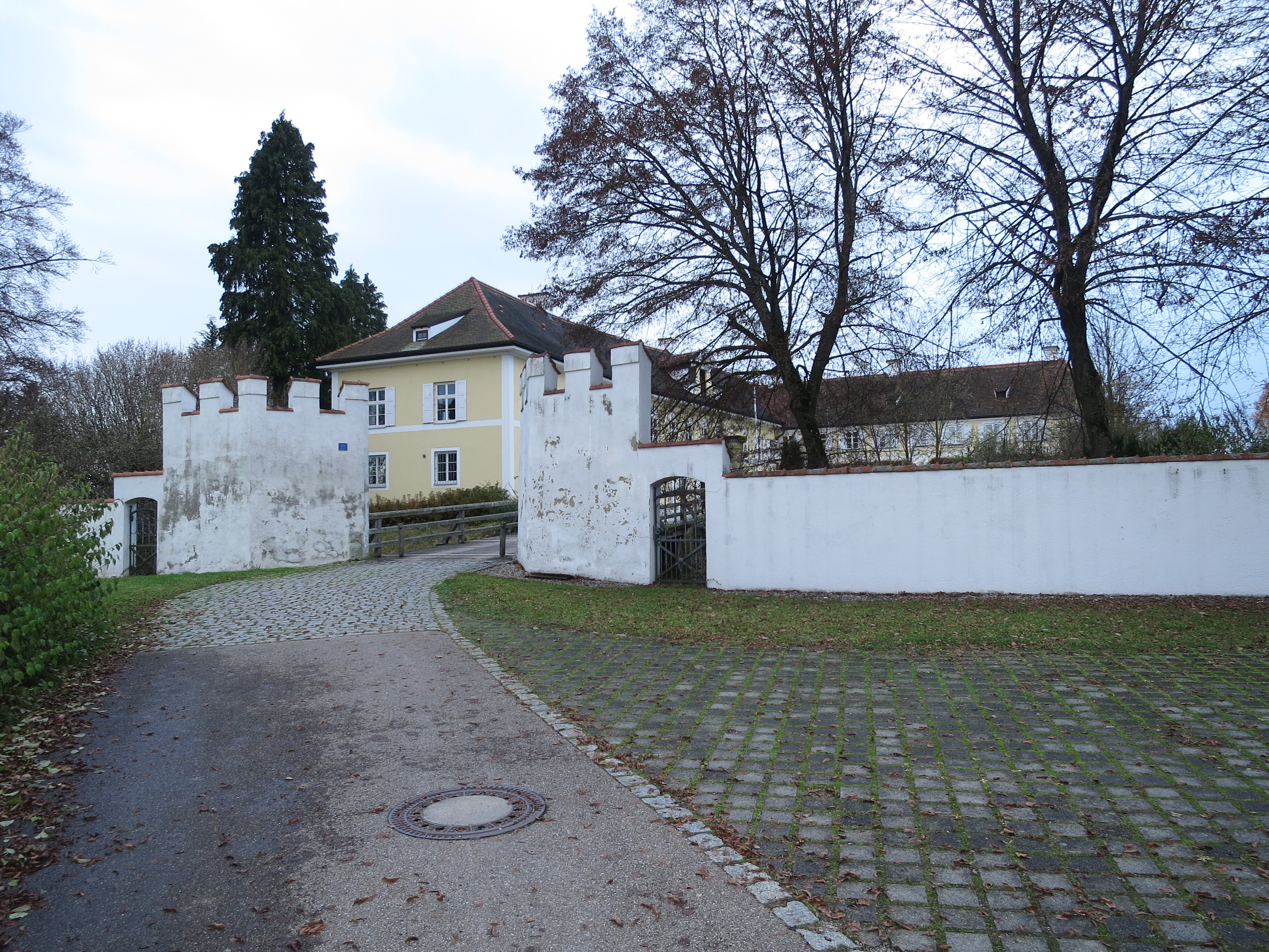 Eingangstor vor dem Wassergraben